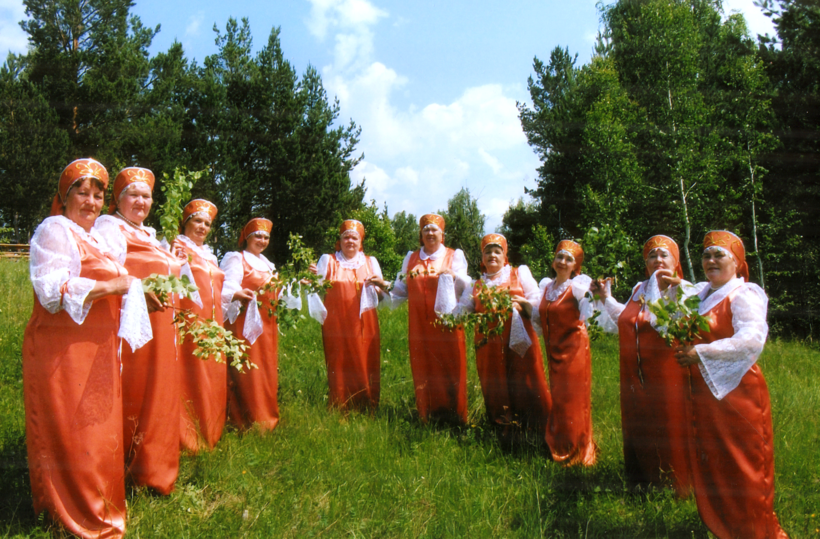 Певческий коллектив "Горлица" п. Ертарский.